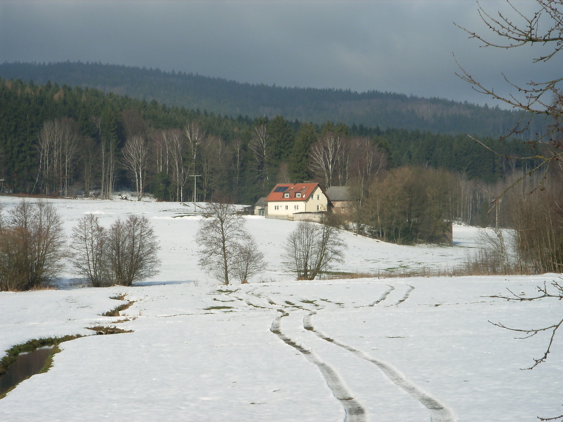 Andreasthal im Hüttenbach-Tal bei Weiding